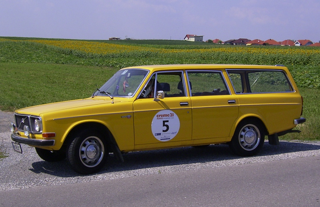 Volvo 145 in Burgenland/Austri